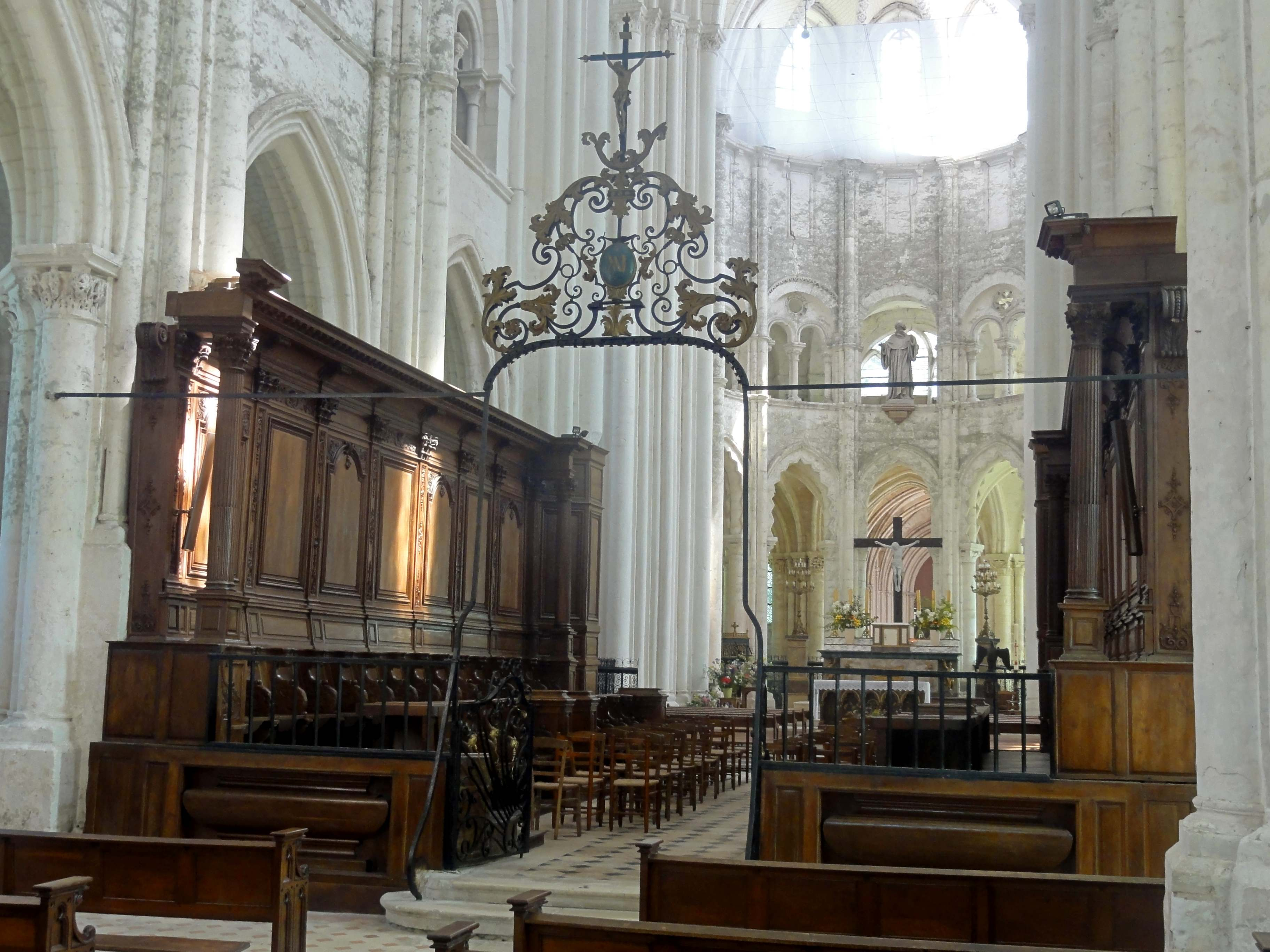 Nef, 7e et 8e travée, vue vers le nord-est sur les stalles de 1722.